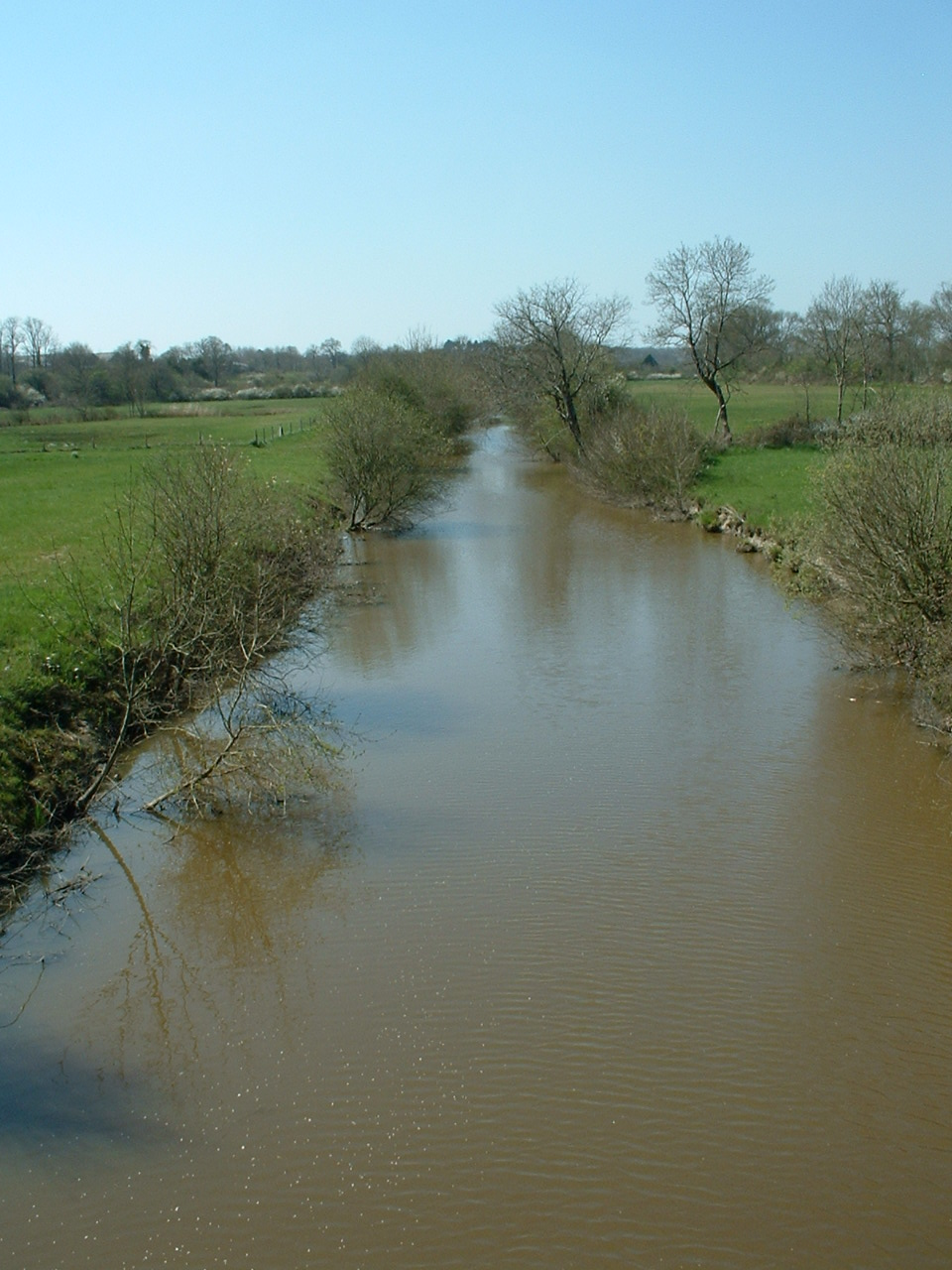 Chauvé (France) - Le canal de Haute-Perche au niveau du pont de Clion